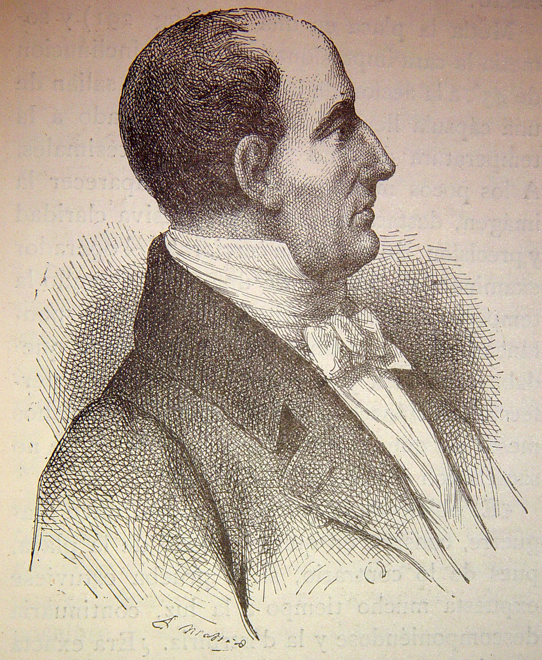 Ilustraciones pertenecientes al libro : El mundo físico : gravedad, gravitación, luz, calor, electricidad, magnetismo, etc. / A. Guillemin. - Barcelona Montaner y Simón, 1882